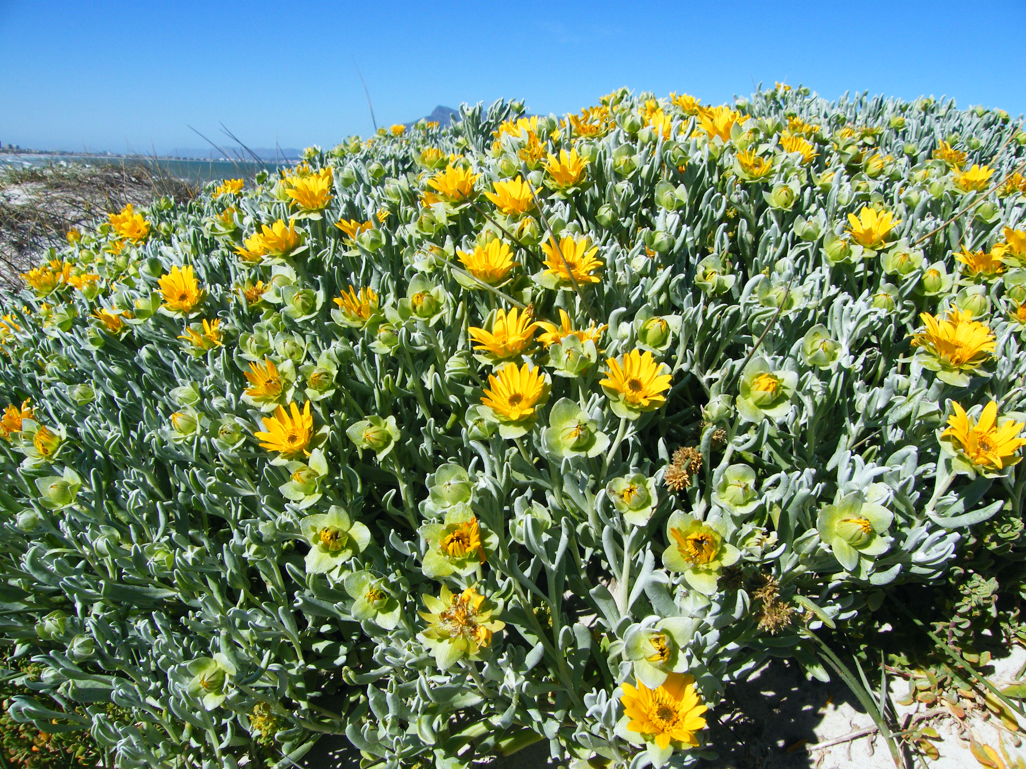 gousblom